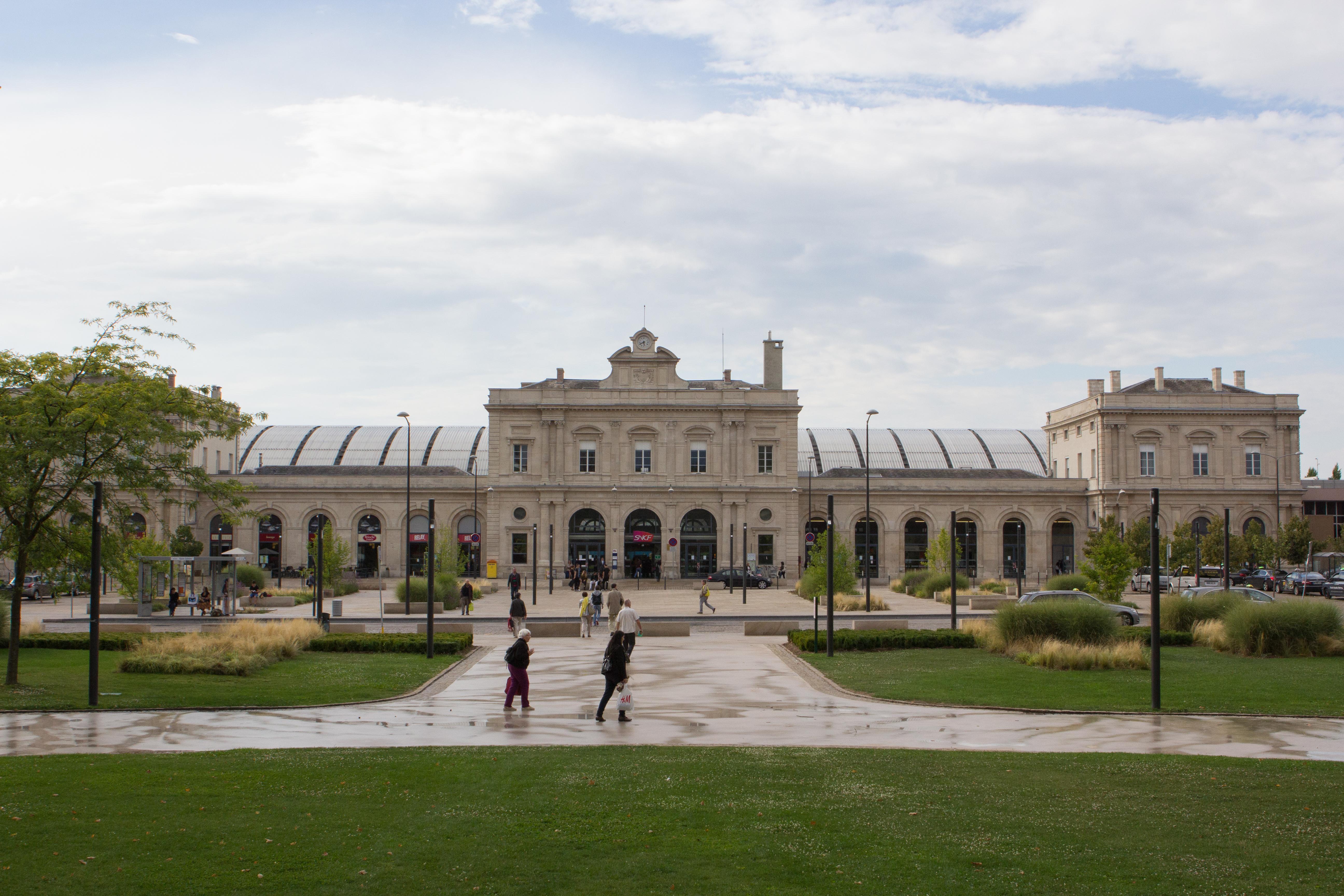 Vue de la façade du bâtiment voyageur de la gare de Reims / Reims, Marne, France